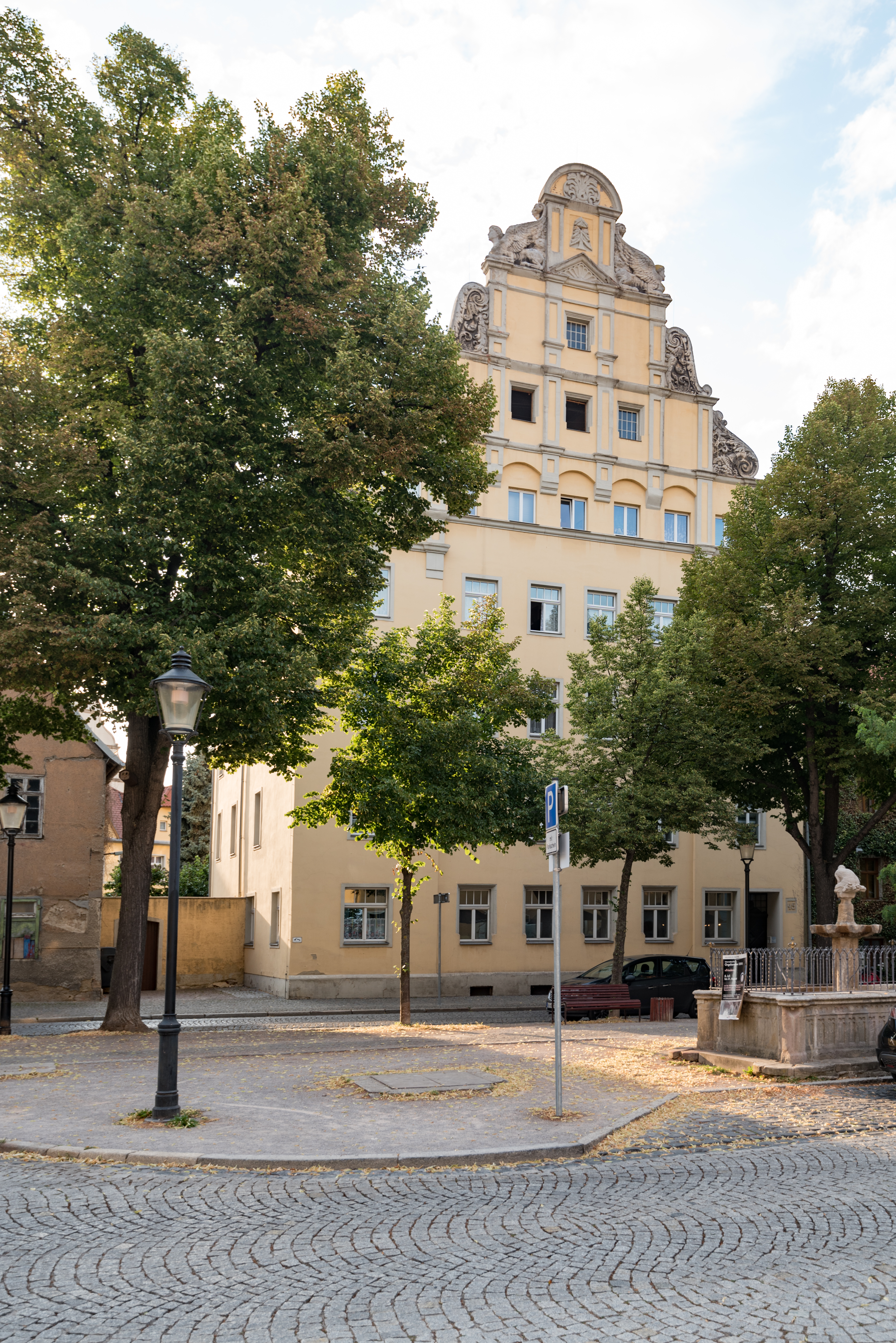 Naumburg (Saale), Lindenring 45